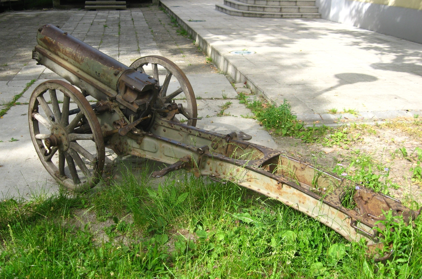 Брдски топ 75 mm Шкода М.15 у дворишту Народног Музеја у Крагујевцу. Снимио: Mice, 12.06.2010